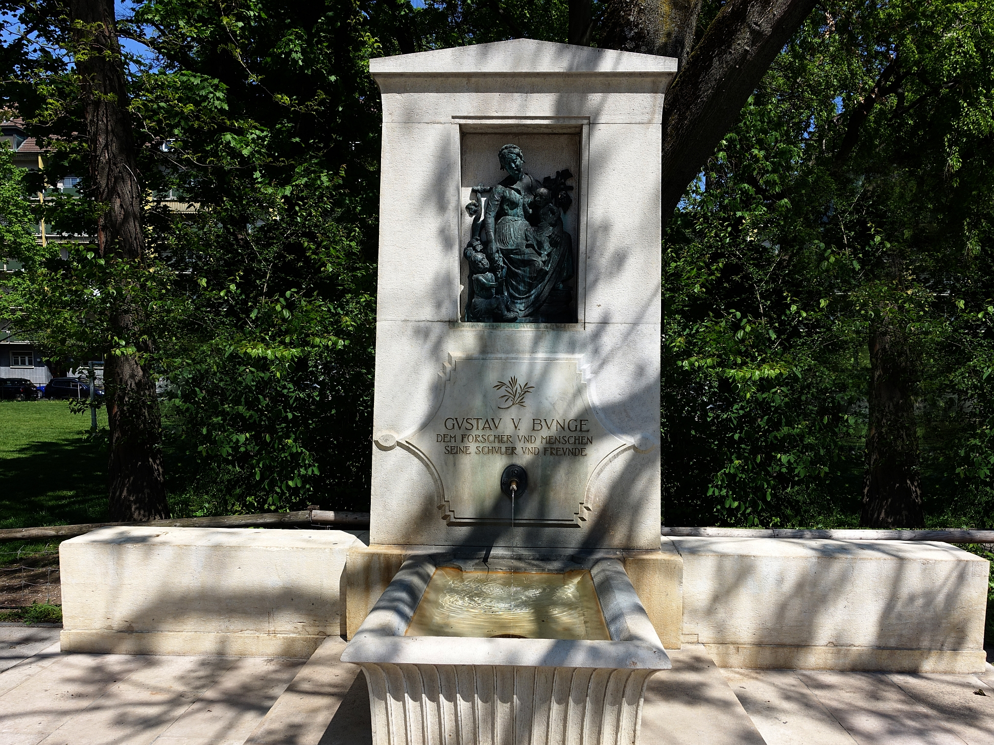 Gustav von Bunge (1844–1929) Dem Forscher und Menschen. Seine Schüler und Freunde. Standort. Universitäts-Kinderspital Basel